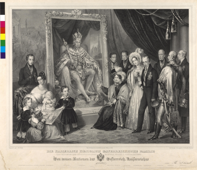 Zeichnung nach eigenem Entwurf von Johann Ender, wiedergegeben in einer Lithografie von Thomas Driendl. China. Wappen.